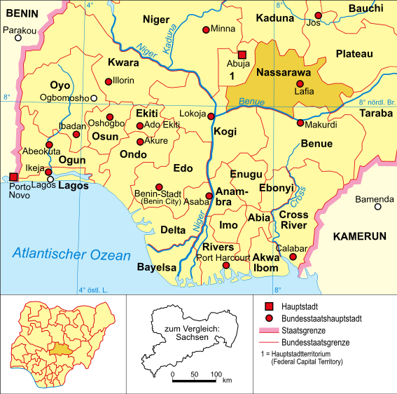 Politische Karte Nigerias (Bundesstaat Nassarawa hervorgehoben)